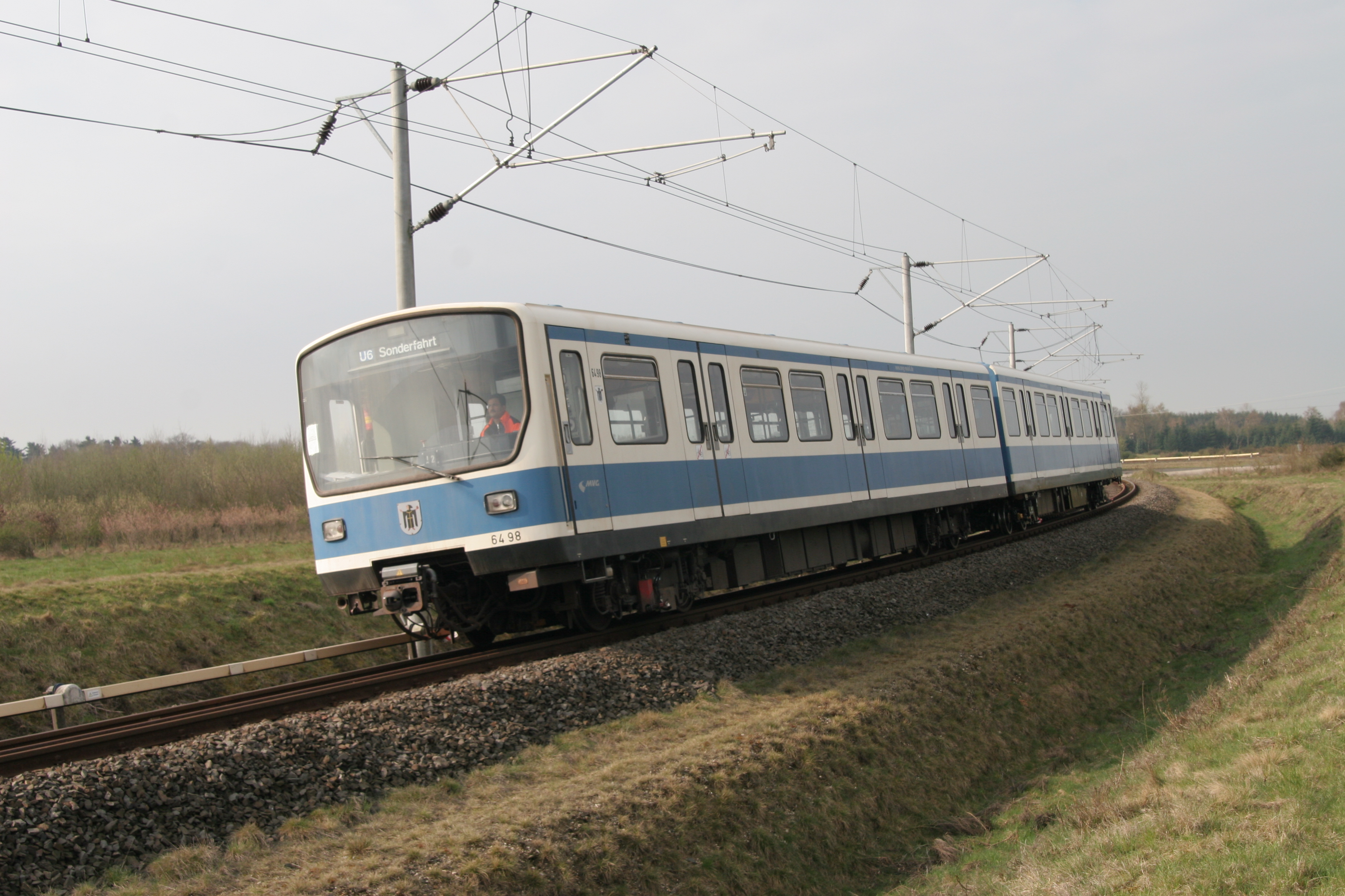 Prototyp Fahrzeug im Prüfcentrum Wegberg-Wildenrath